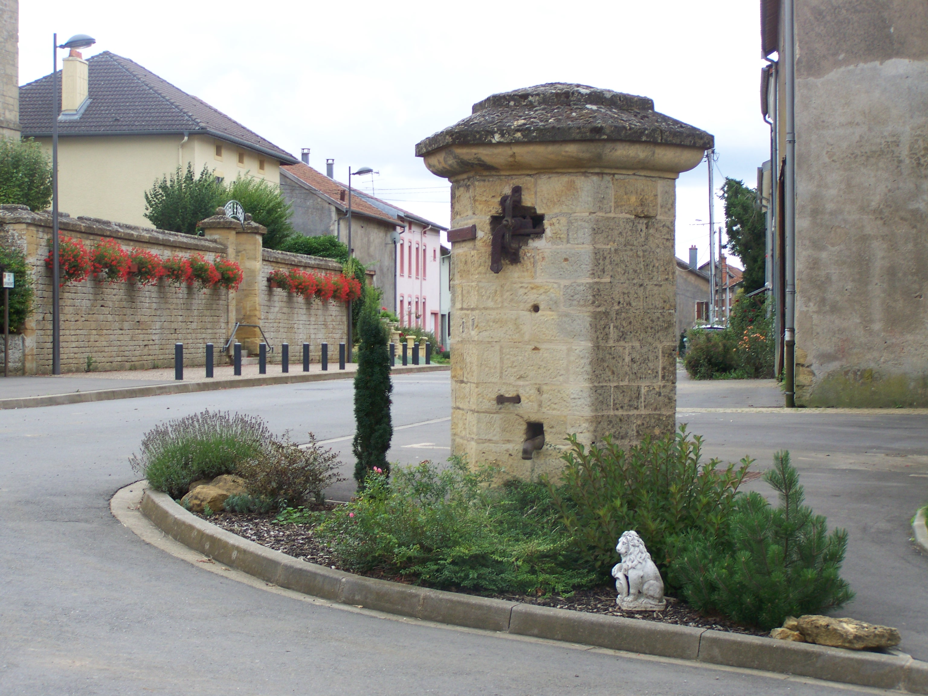 Ancien puis à Chénières